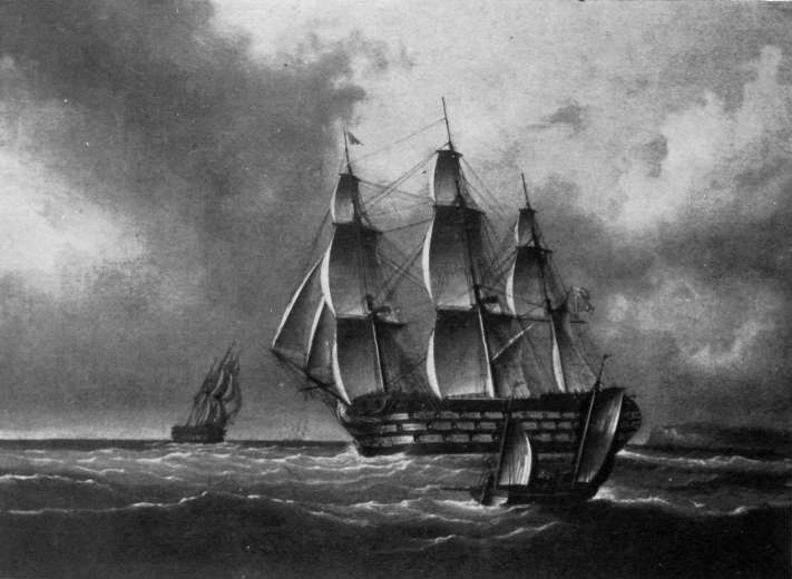 HMS Blenheim, c. 1825.